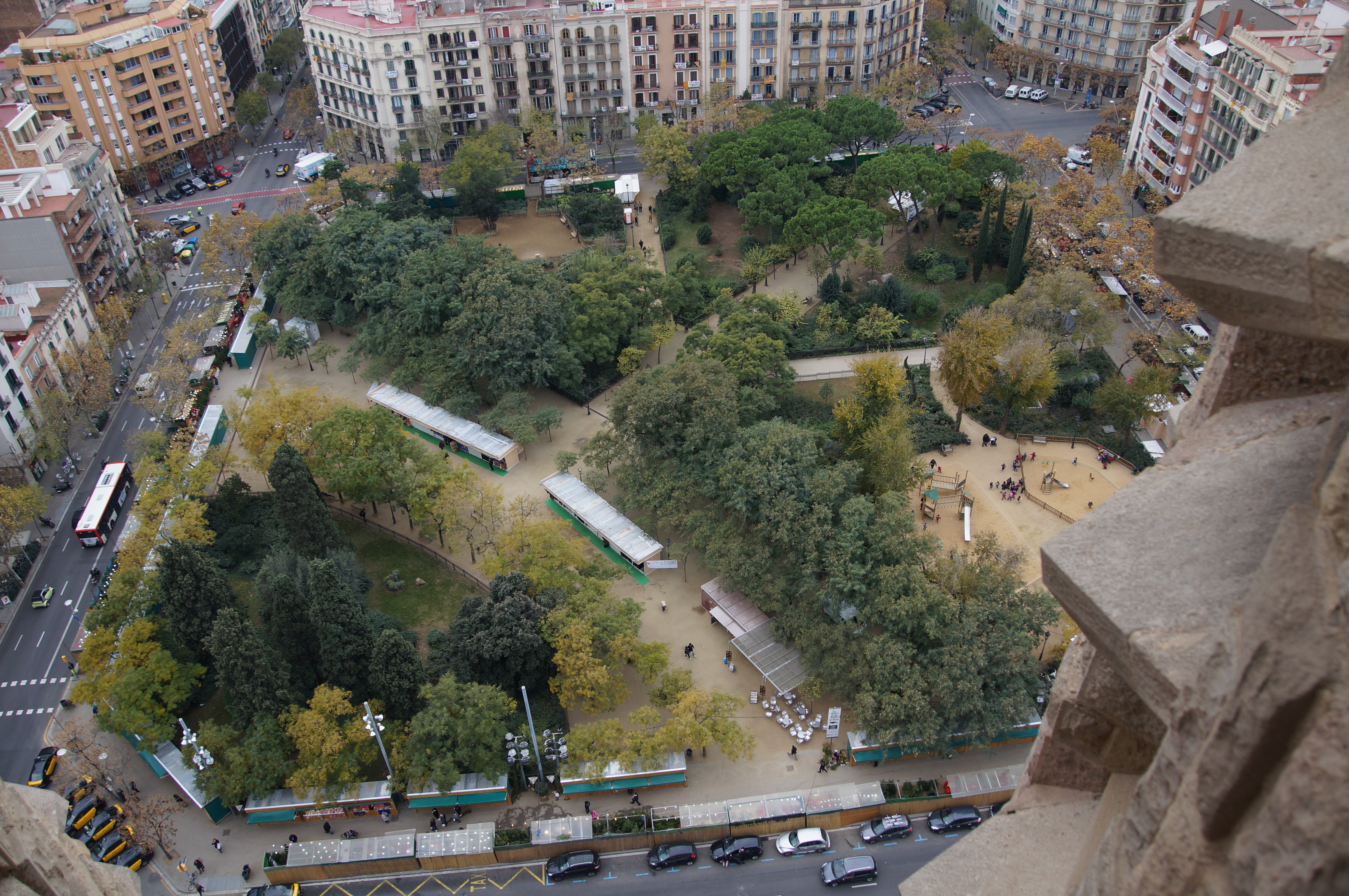 Temple Expiatori de la Sagrada Família (Barcelona)